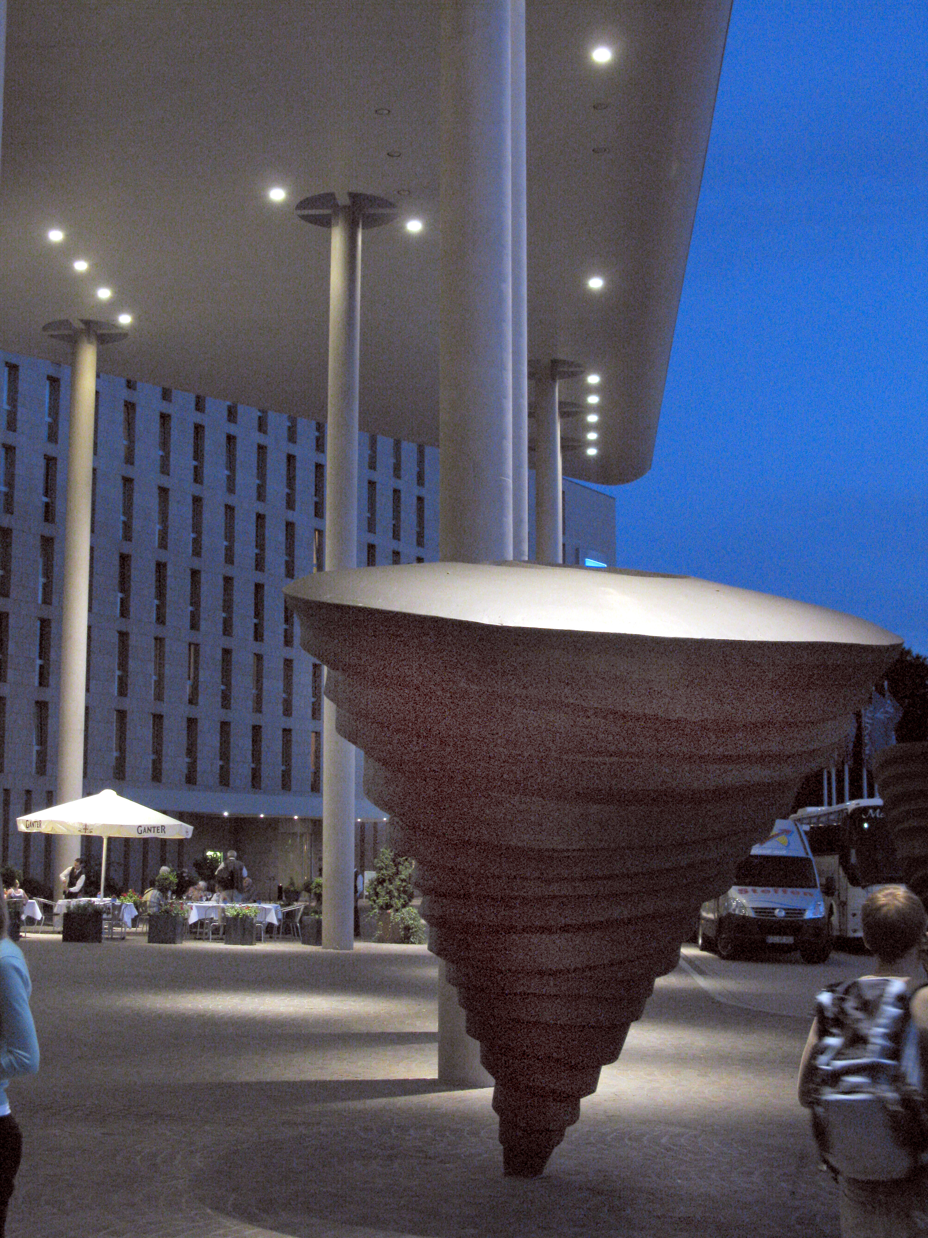 Andrea Zaumseil, Tanzende Kegel, 1996/2000 vor dem Konzerthaus Freiburg